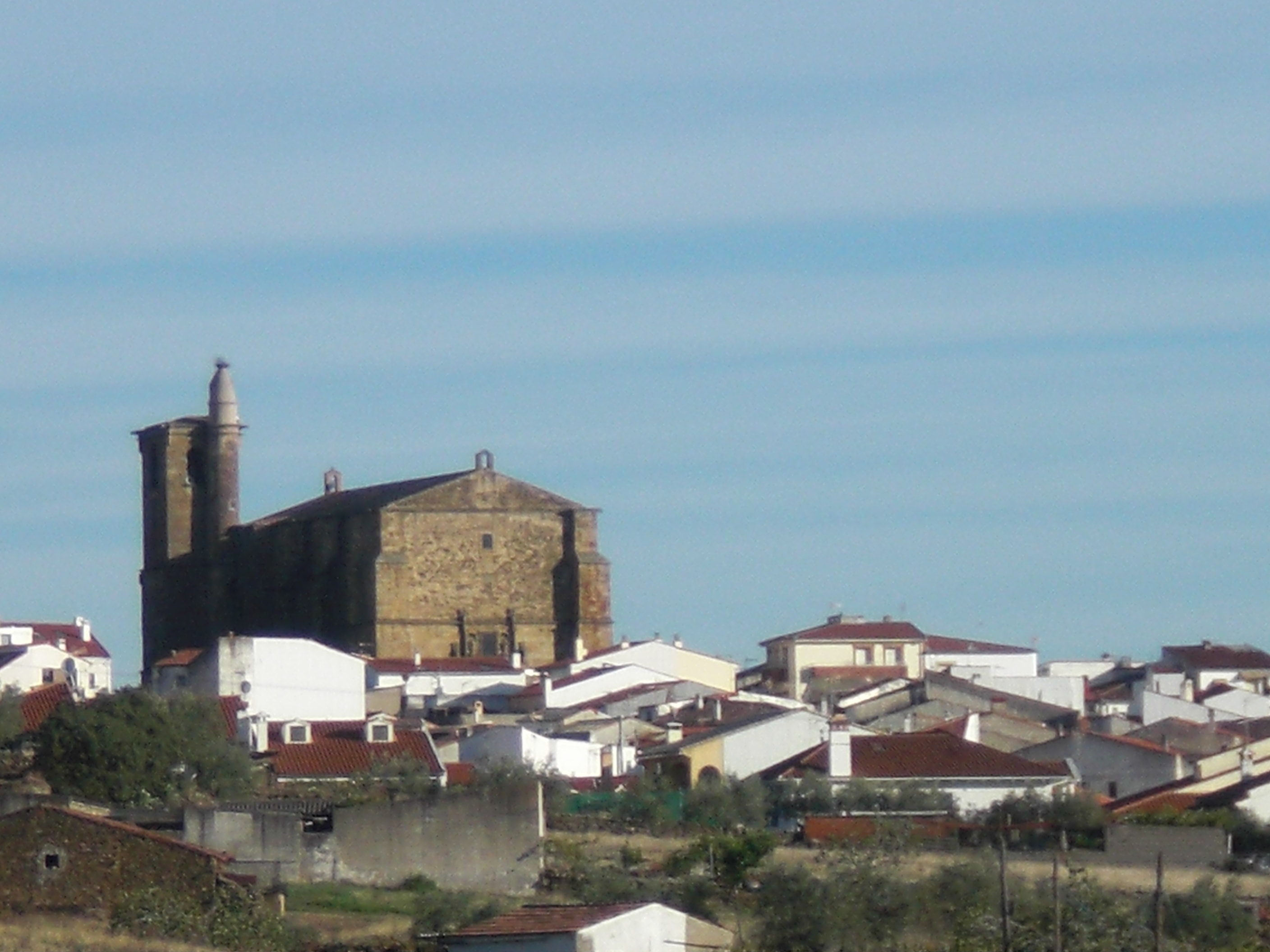 Centro de Malpartida de Plasencia